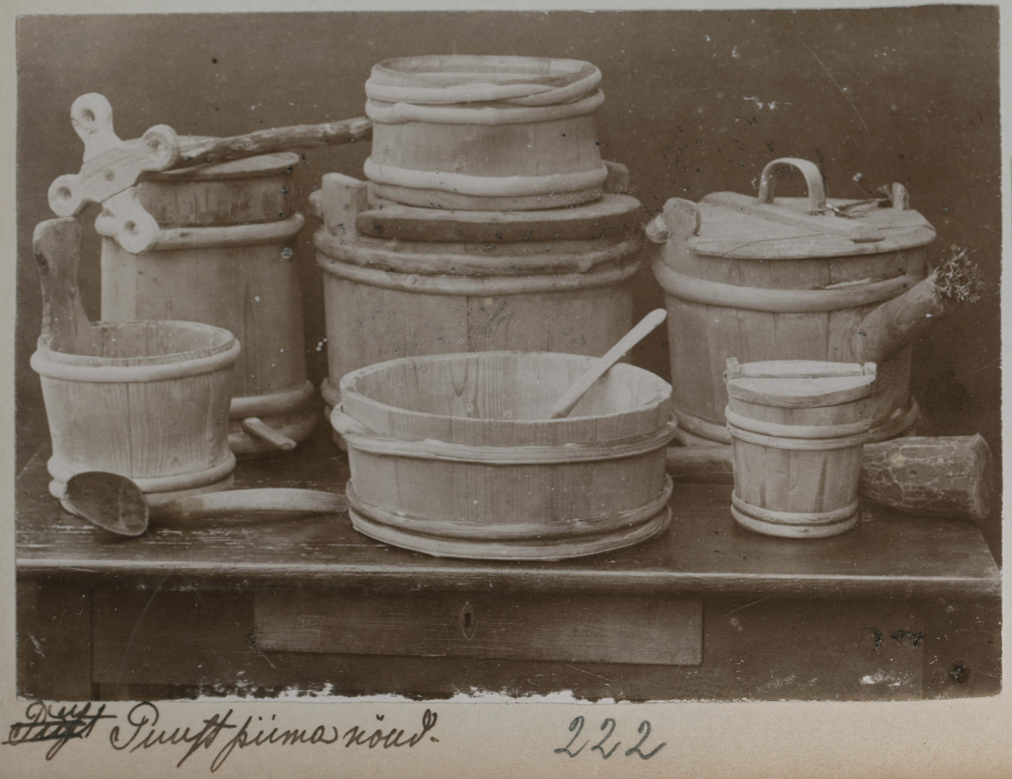 puust piimanõud